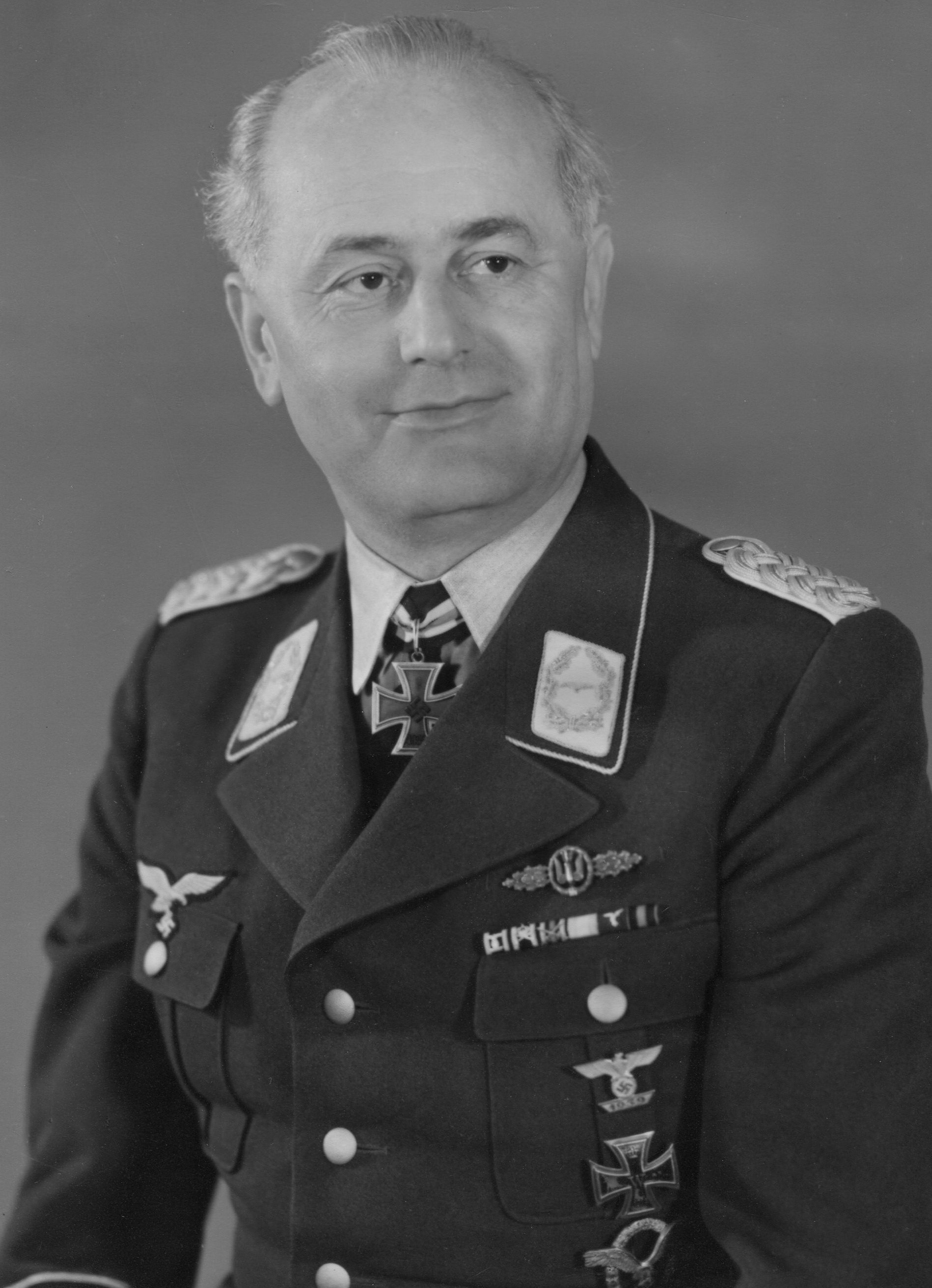 Generalmajor der Luftwaffe (Wehrmacht) Otto Paul Wilhelm Höhne (1895-1969)